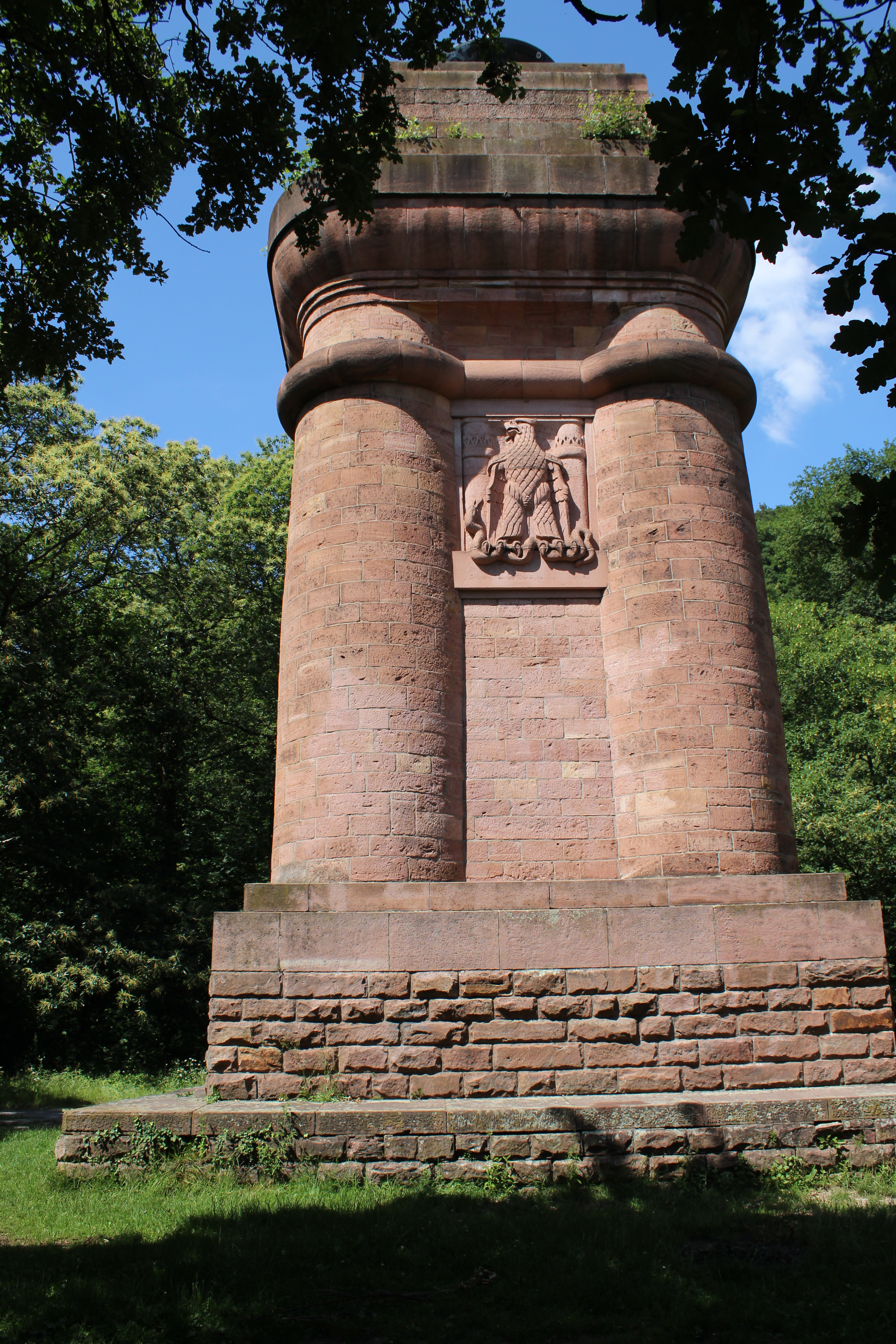 Bismarckturm Heidelberg